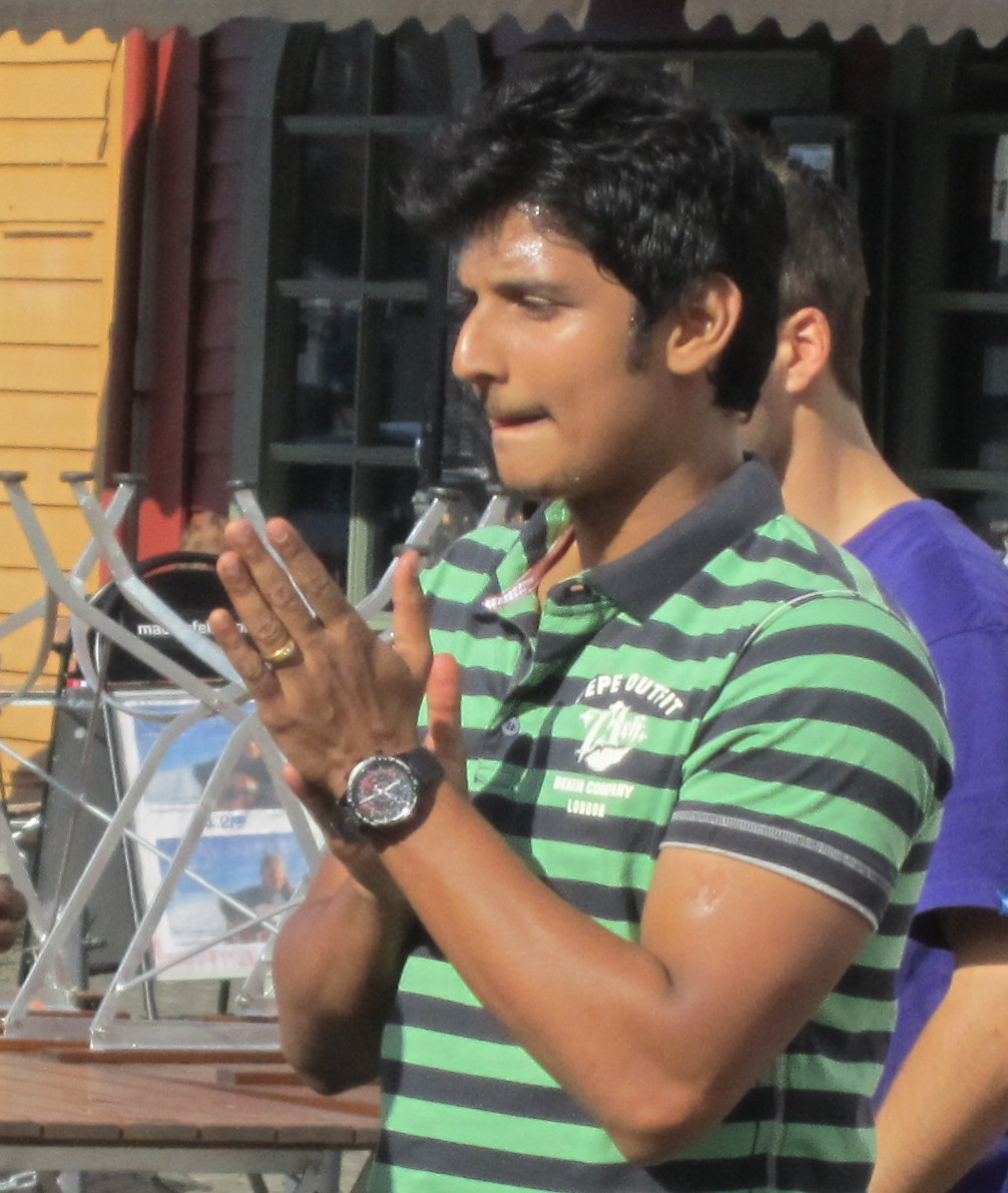 2010 - வெளிநாட்டில் தமிழ் படப்பிடிப்பு, பேர்கன் நகரின் Bryggen இல் 'கோ' படப்பிடிப்பு, படப்பிடிப்புக் குழுவினர் தயார்ப்படுத்தலில் ஈடுபட்டு இருக்கின்றனர்.